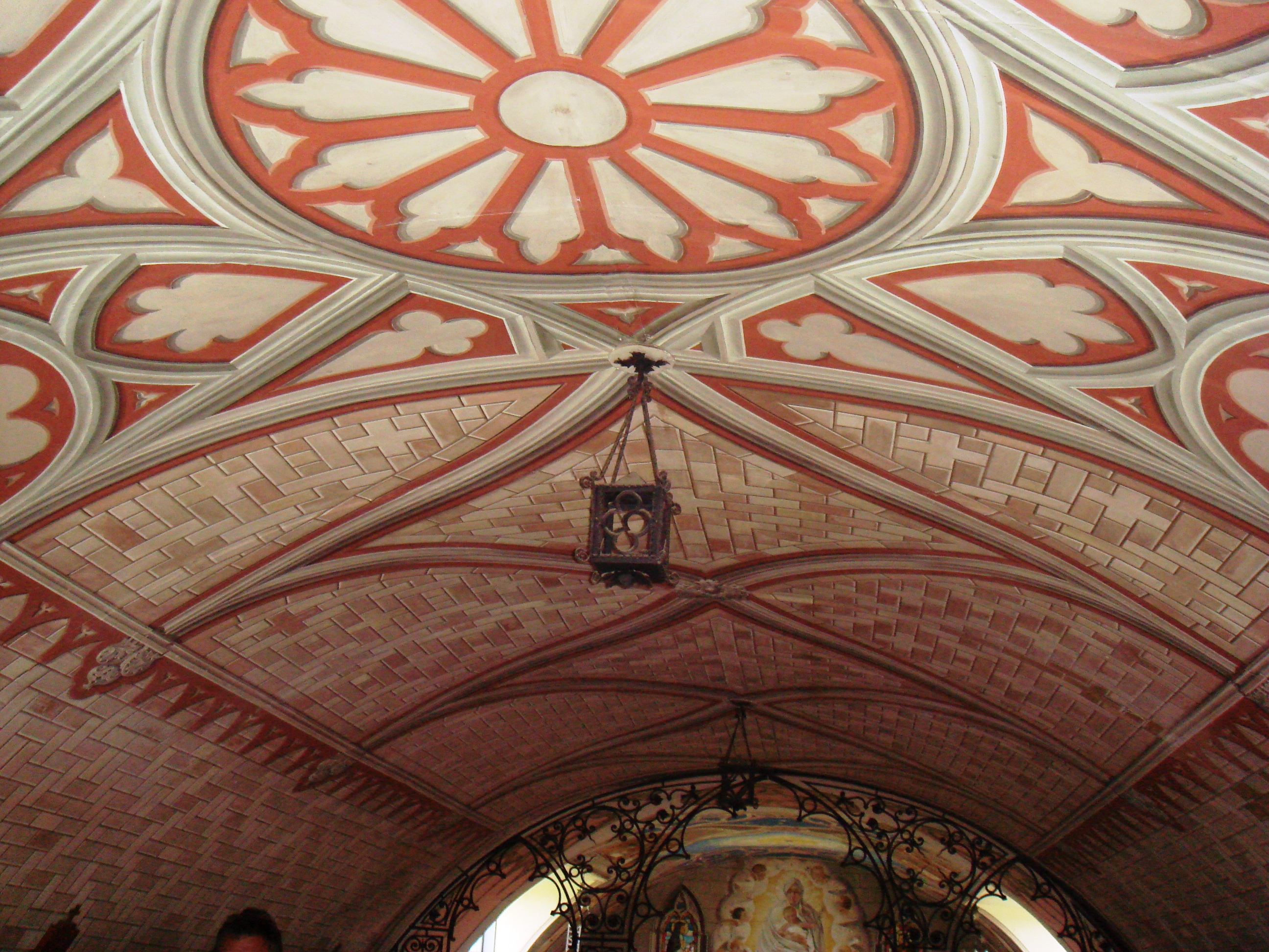 Capilla italiana, Islas Orcadas (Escocia)